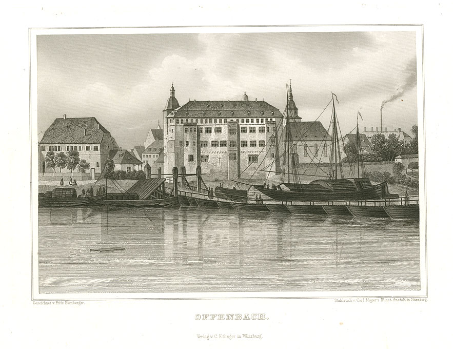 Offenbach. Stahlstich nach Vorzeichnung von Fritz Bamberger, 1847, aus: Ludwig Braunfels; Die Mainufer und ihre nächsten Umgebungen. Verlag Carl Etlinger, Würzburg 1847. Gedruckt in der Kunstanstalt von Carl Mayer, Nürnberg.